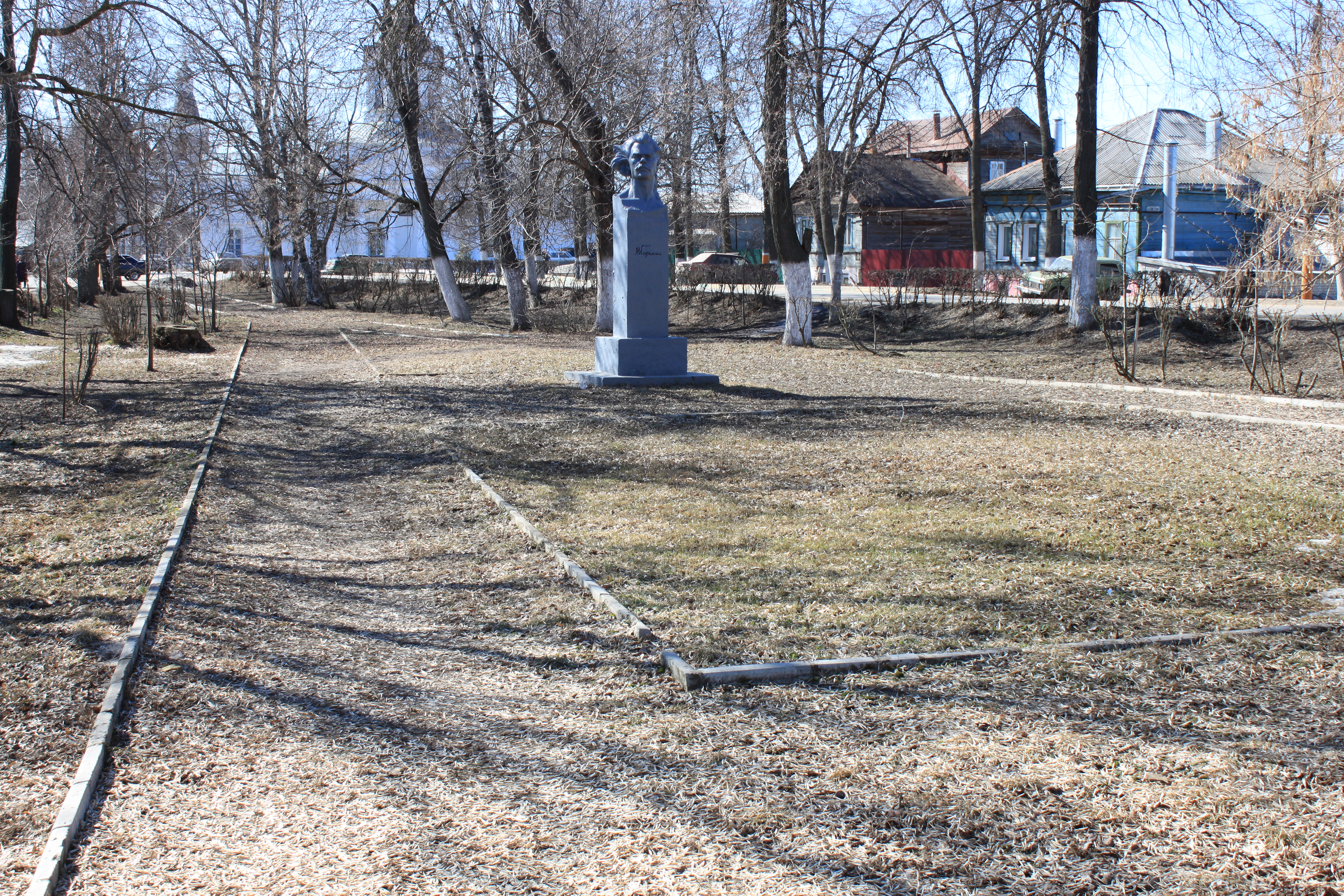 Gorky park